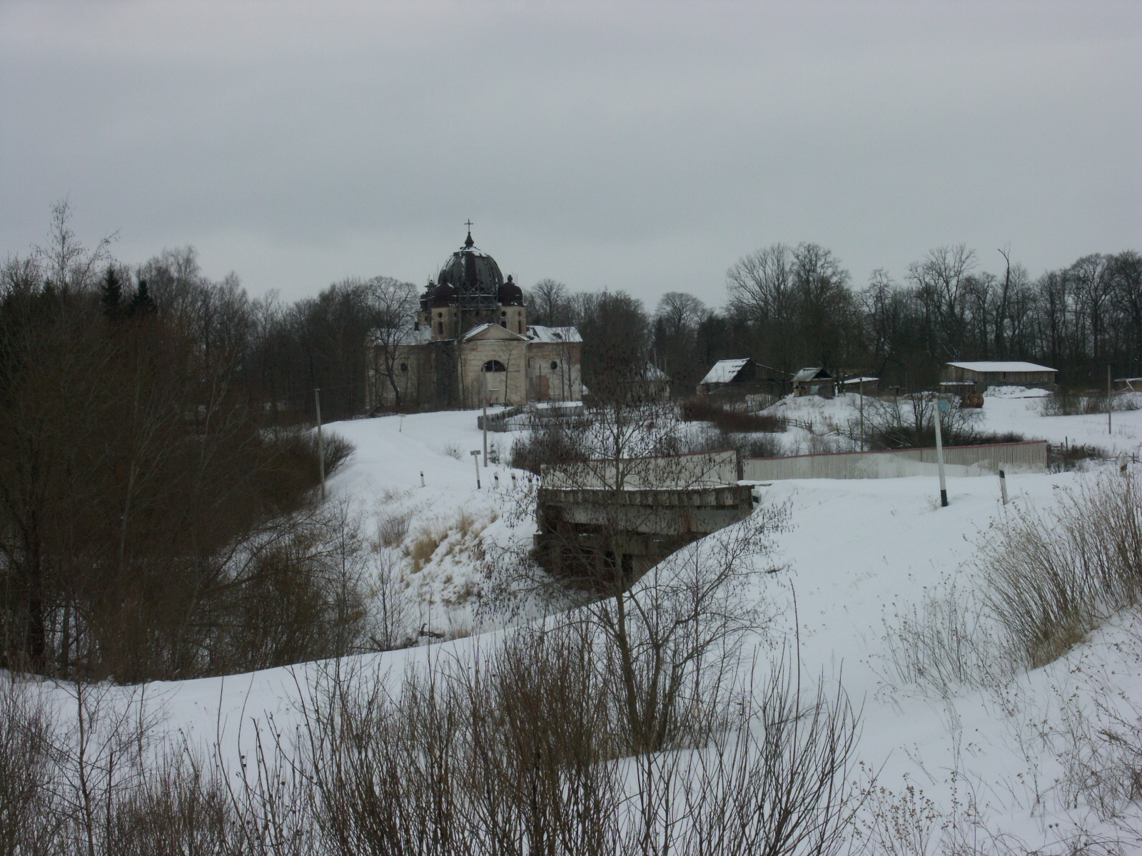 Церковь Вознесения (Псковская область, Порхов, деревня Бельское Устье)